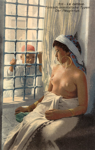 705 - Le curieux.